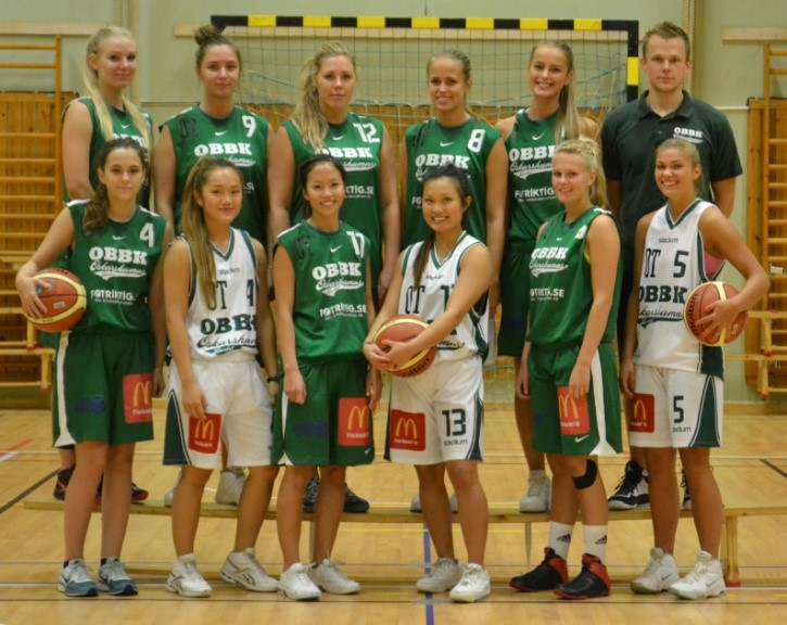 Lagfoto på damlaget säsongen 2016/17